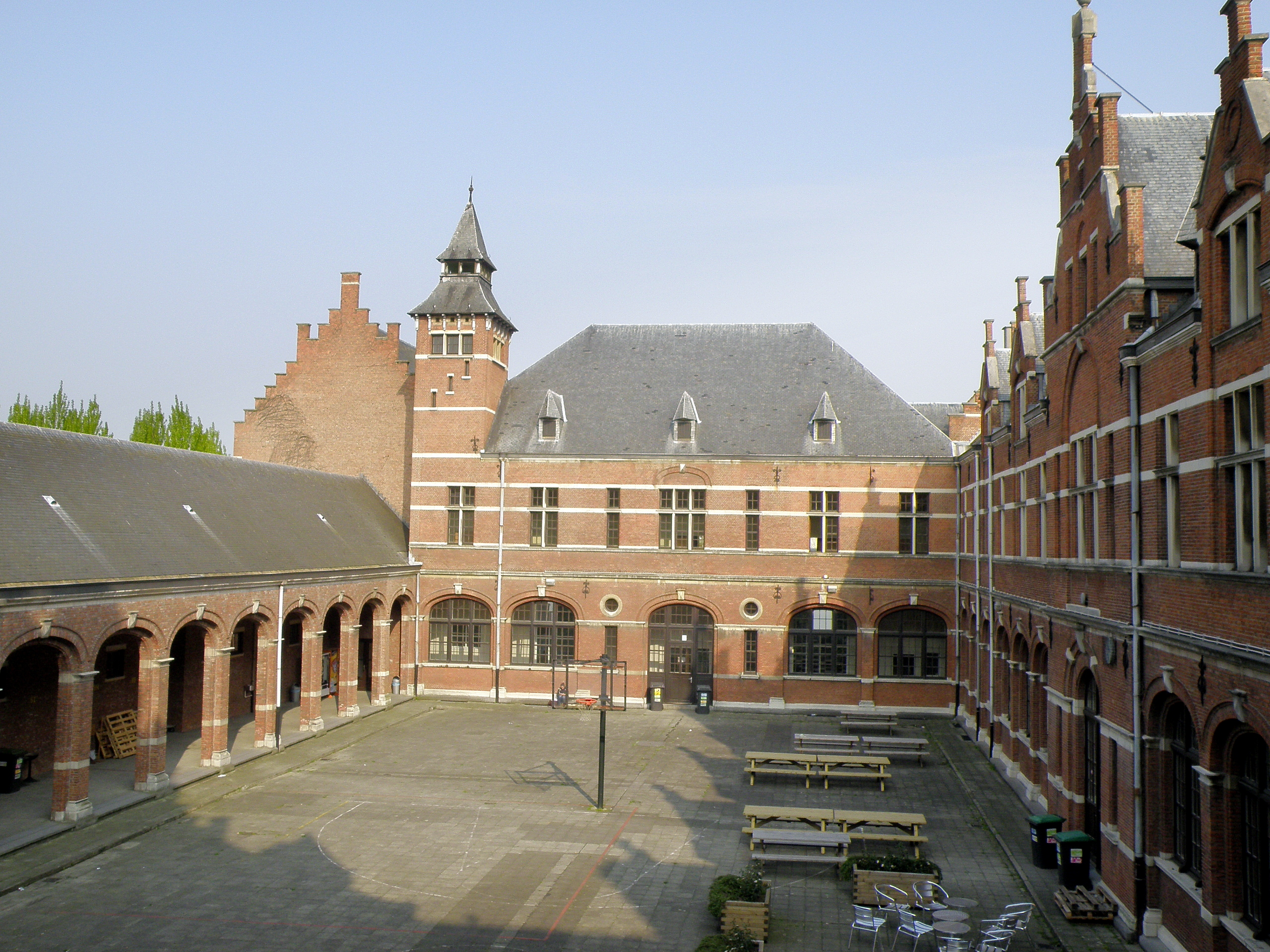 Antwerpen, district Antwerpen. Voormalig Jongensweeshuis aan de Durletstraat, thans hogeschool. Ontwerp van Henri en Leonard Blomme, 1881. Achterste vleugel van het binnenplein, met toren; rechts: rechter vleugel; links: linker vleugel met korfbooggalerij. Vgl. verder Inventaris Bouwkundig Erfgoed Vlaanderen.